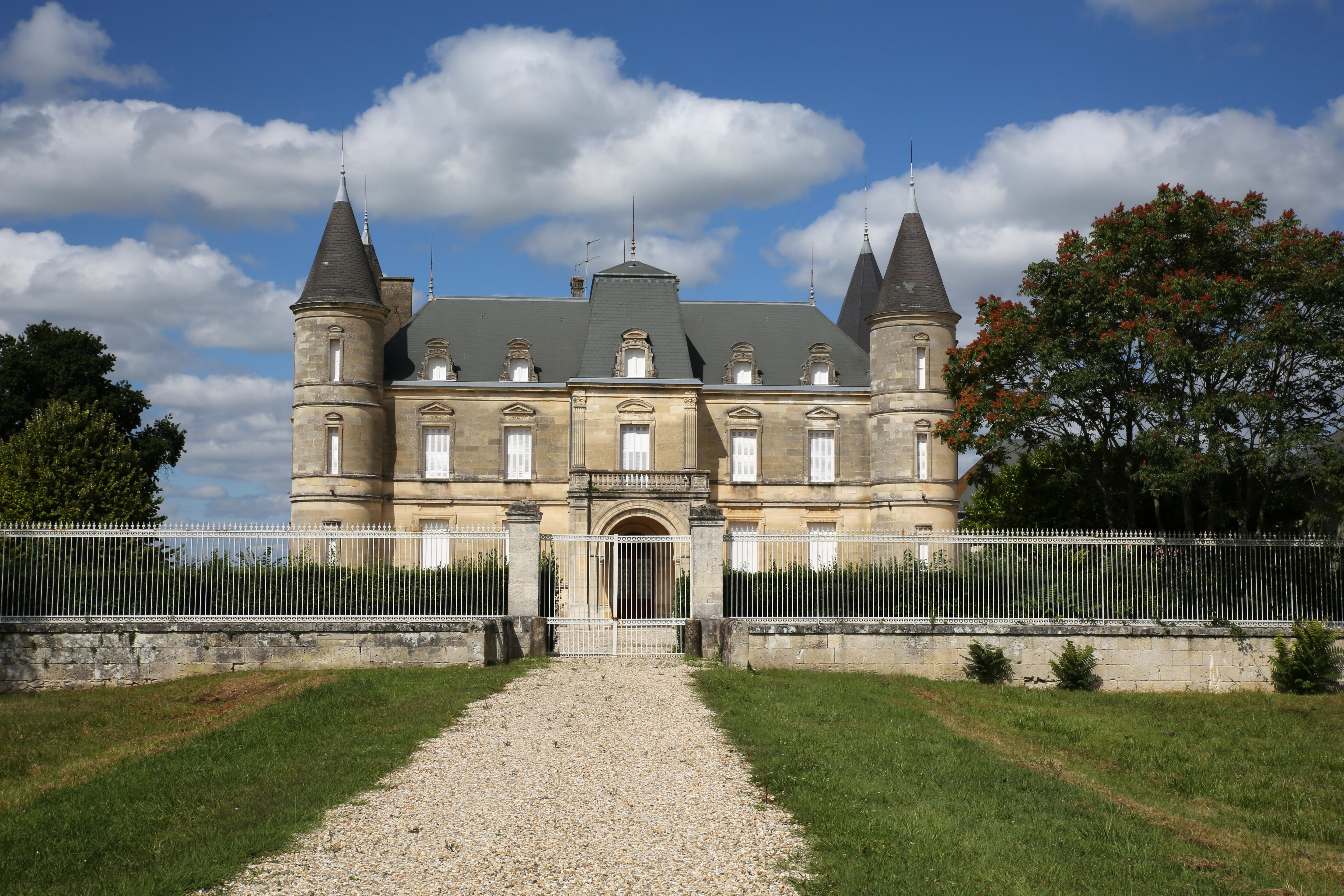 Château Pérenne